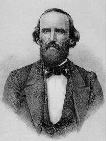 Brig. Gen. Benjamin McCulloch, CSA (1811–1862)